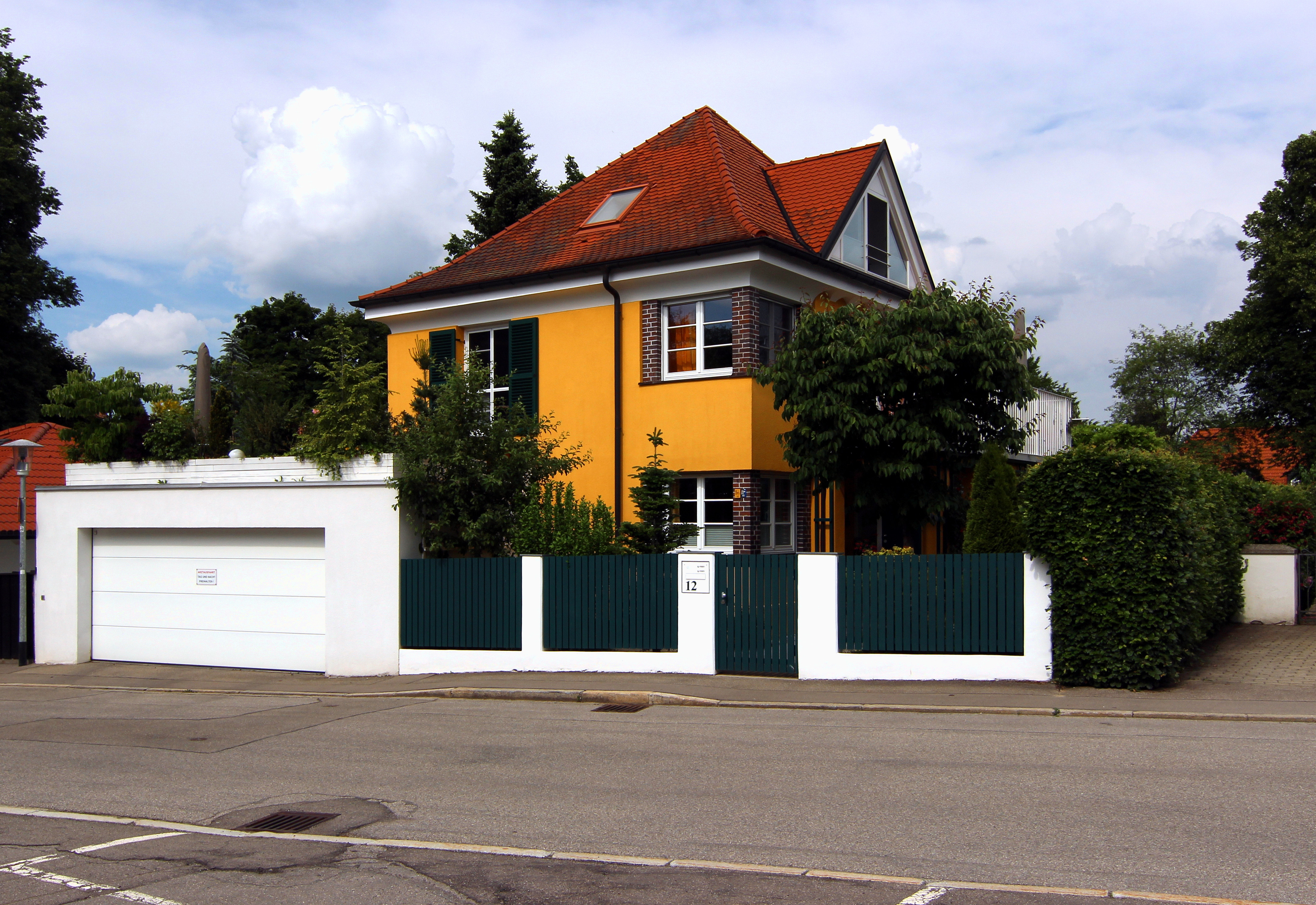 Norm-Villa am Haubenschloss, Architekt: Andor Àkos